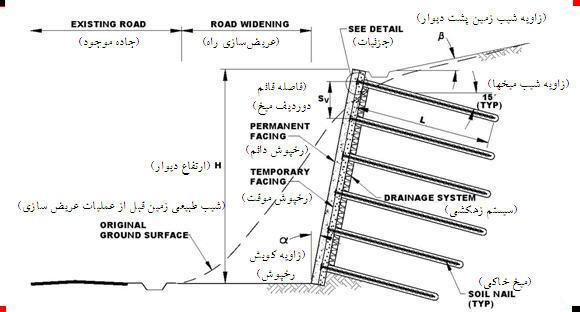 پایدارسازی ترانشه راه عریض سازی شده به روش میخکوبی خاک